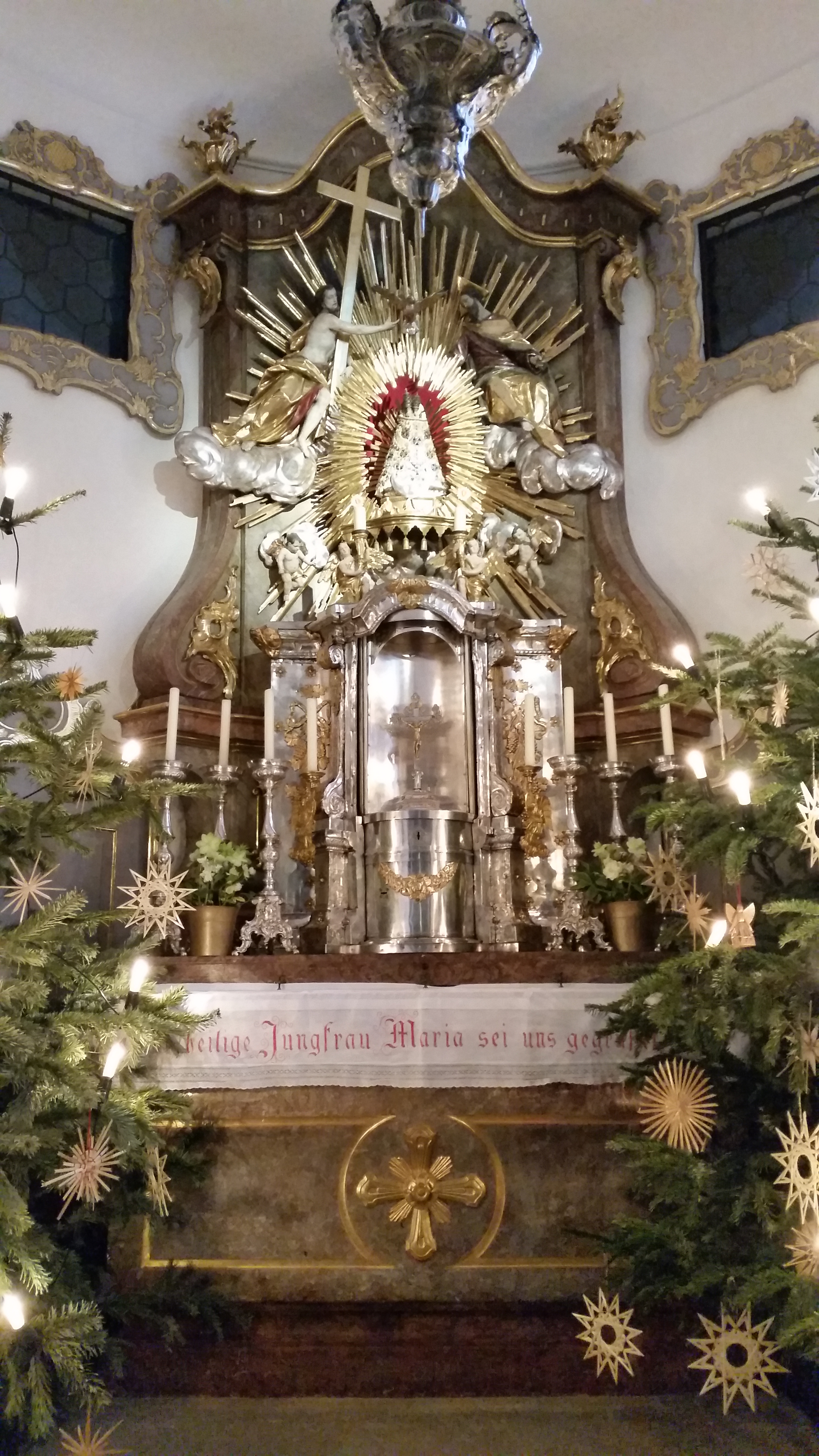 Hochaltar bei Weihnachten